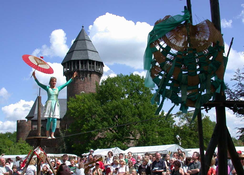 Seiltänzerin im Burgpark, Krefeld-Linn